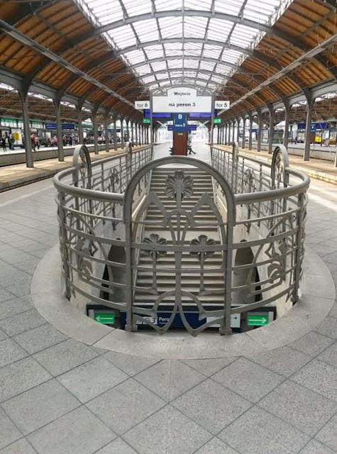 Wrocław, Dworzec Główny - peron 3